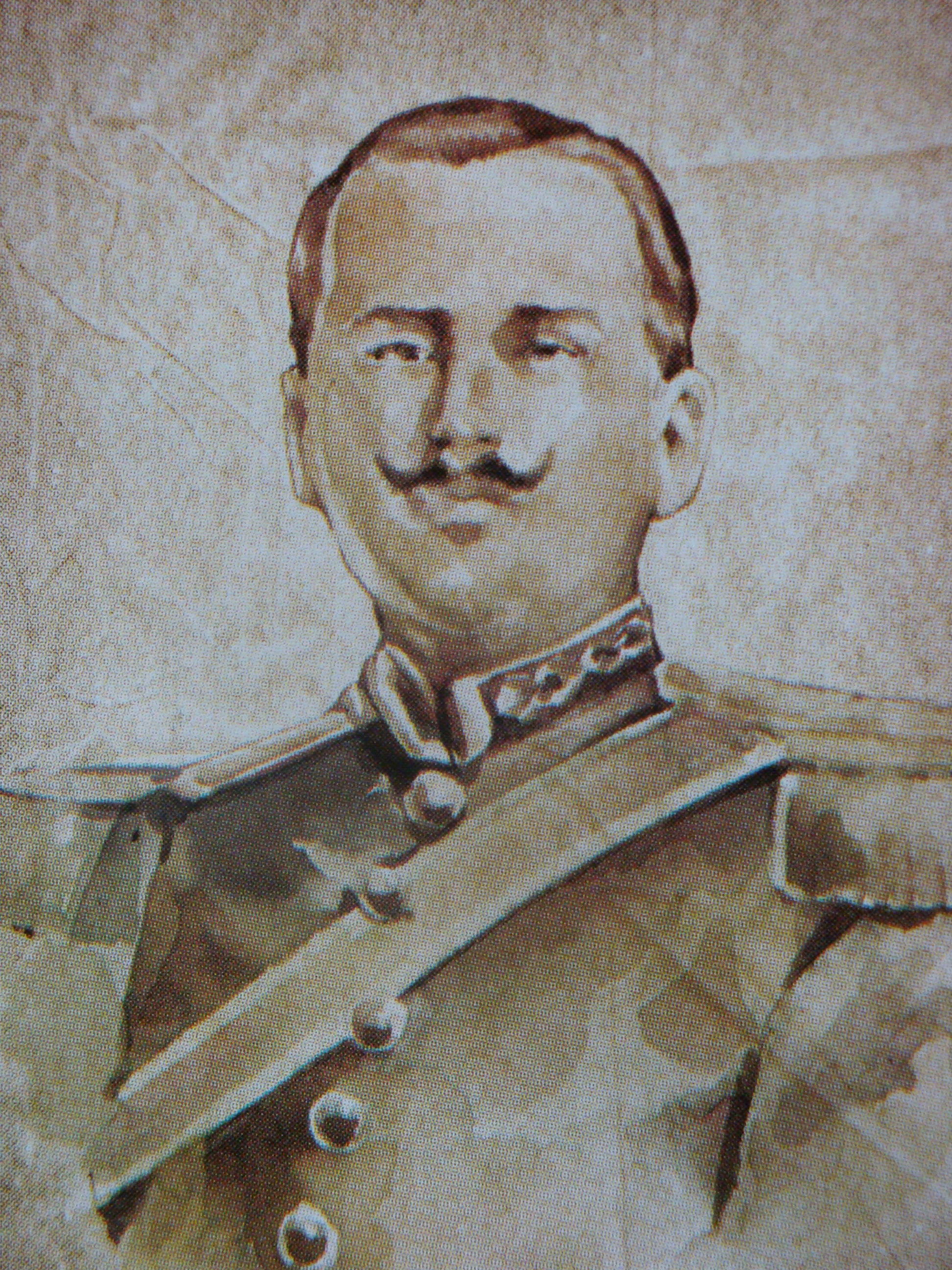 Militar mexicano originario del estado de Tabasco. Participó en la Revolución mexicana en Tabasco. Se desempeñó en el periodísmo fundando varios periódicos en la Ciudad de México. Ocupó varios cargos entre los que destacan Jefe de la Zona Militar en Tabasco, Director del H. Colegio Militar y Director del Archivo Histórico de la Secretaría de la Defensa Nacional.